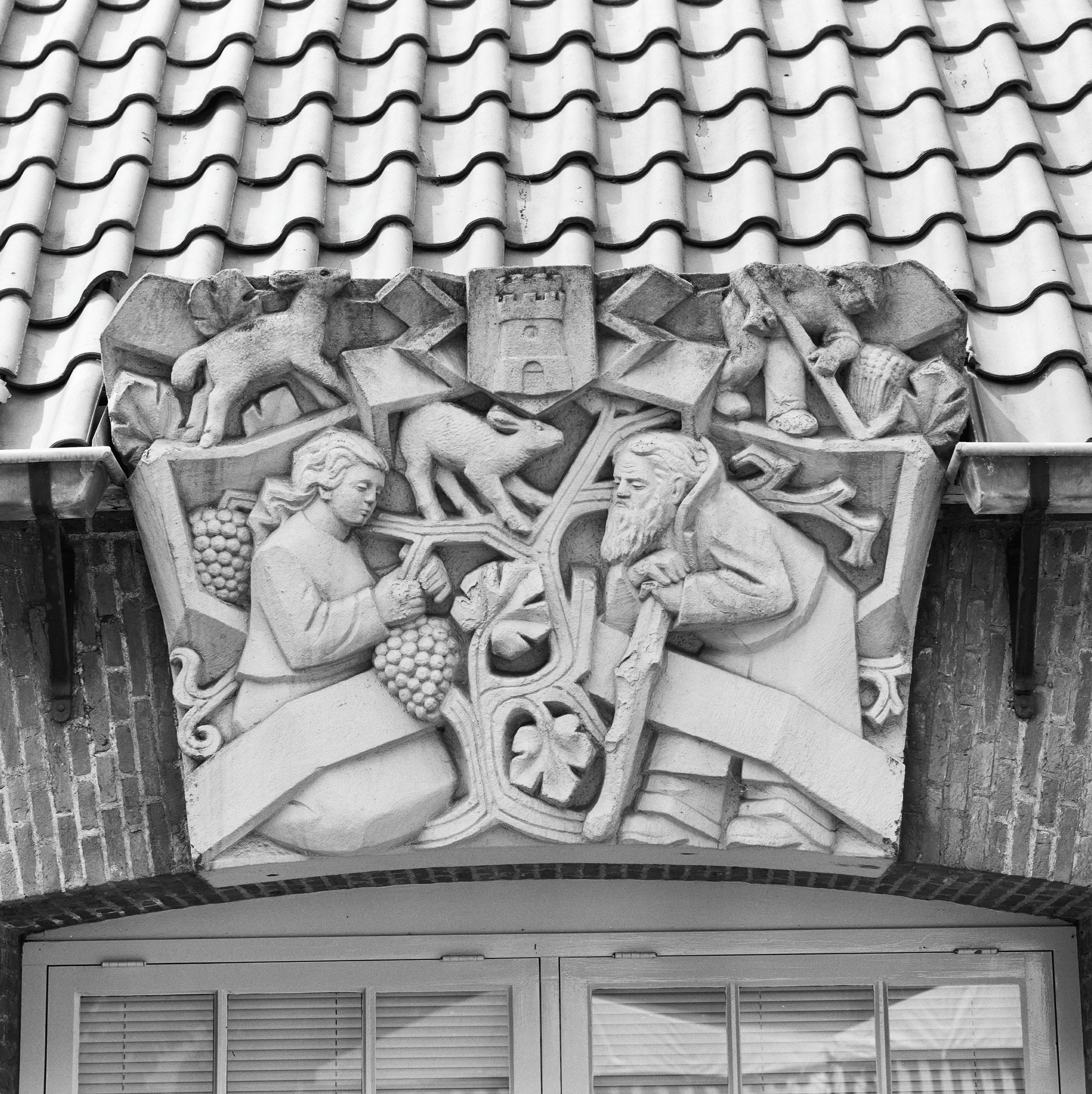 Hofje Onder Den Toren: Detail reliëf